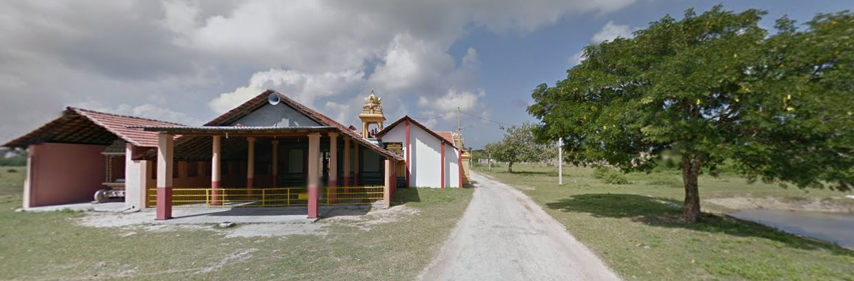 கூகுள் படத்தில்